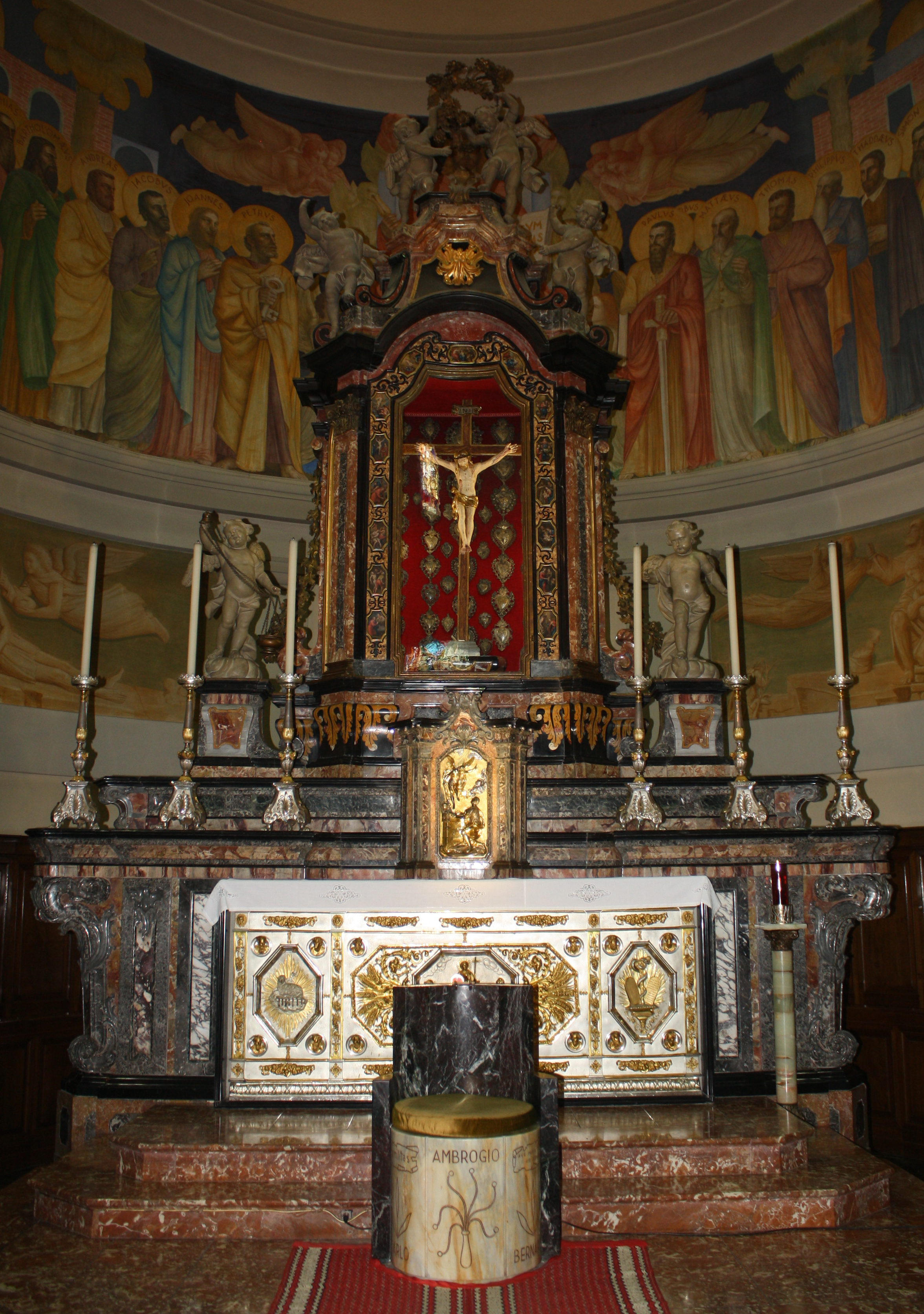 Altare della chiesa dei Santi Pietro e Paolo nuova a Lonate Ceppino, realizzato su disegno di Biagio Bellotti.